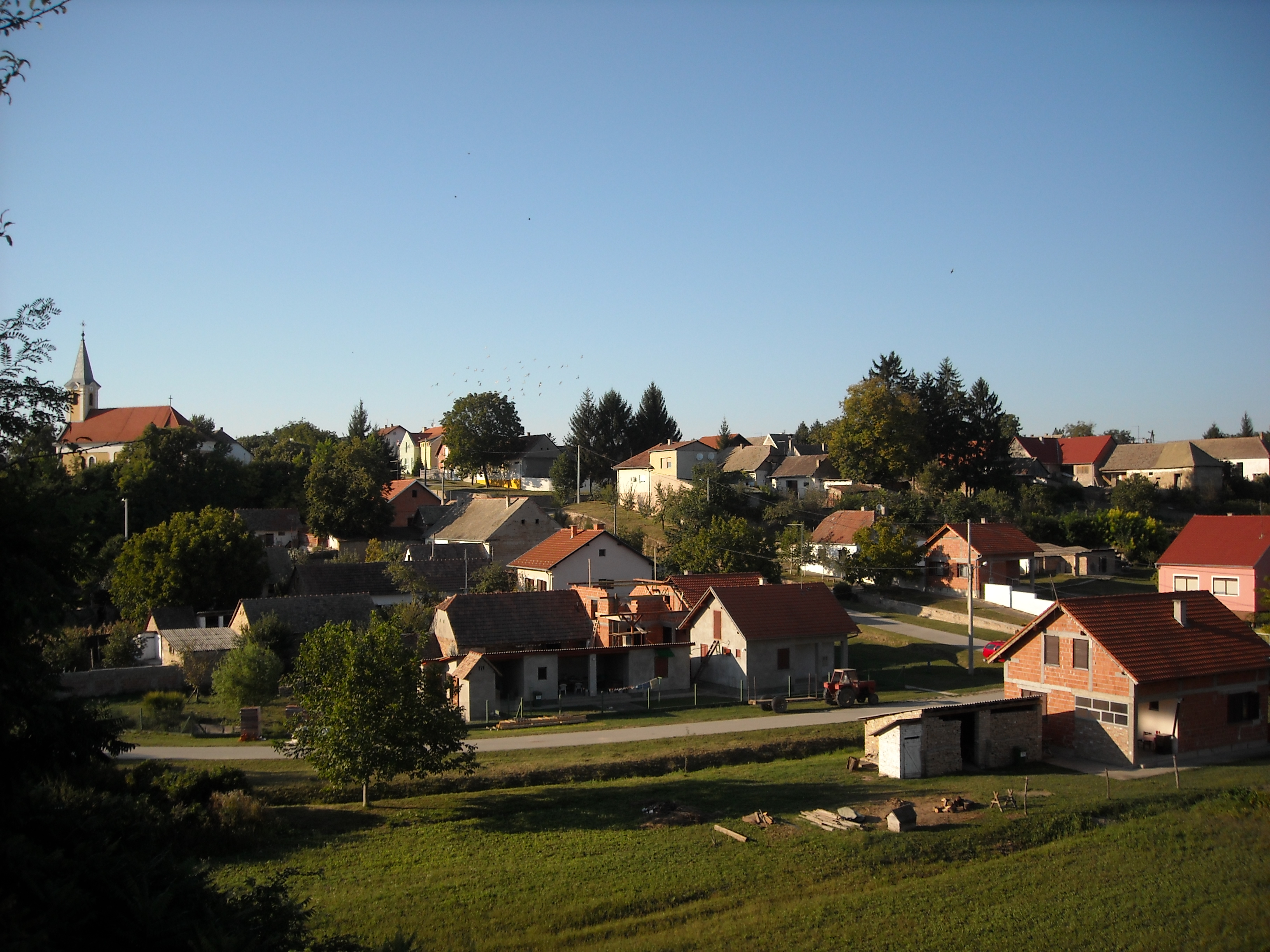 Lovas